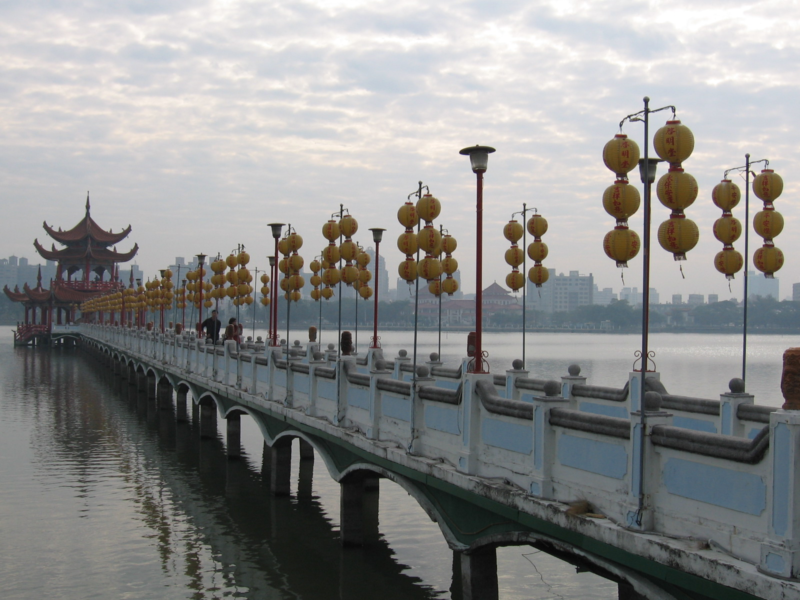 Spring and Autumn Pavilions, Kaohsiung, Taiwan